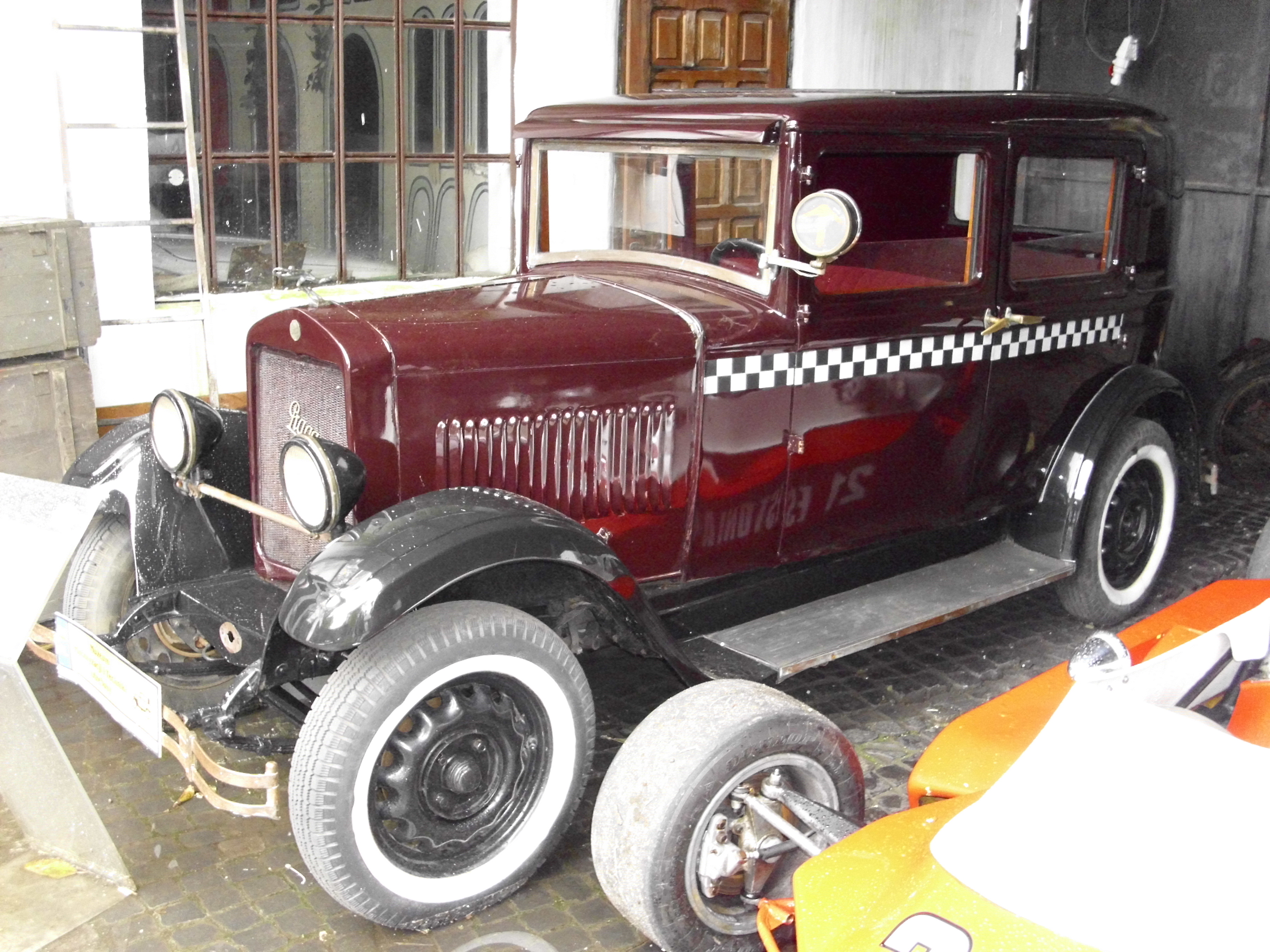 Praga Piccolo von Oswiecim-Praga, ab 1930